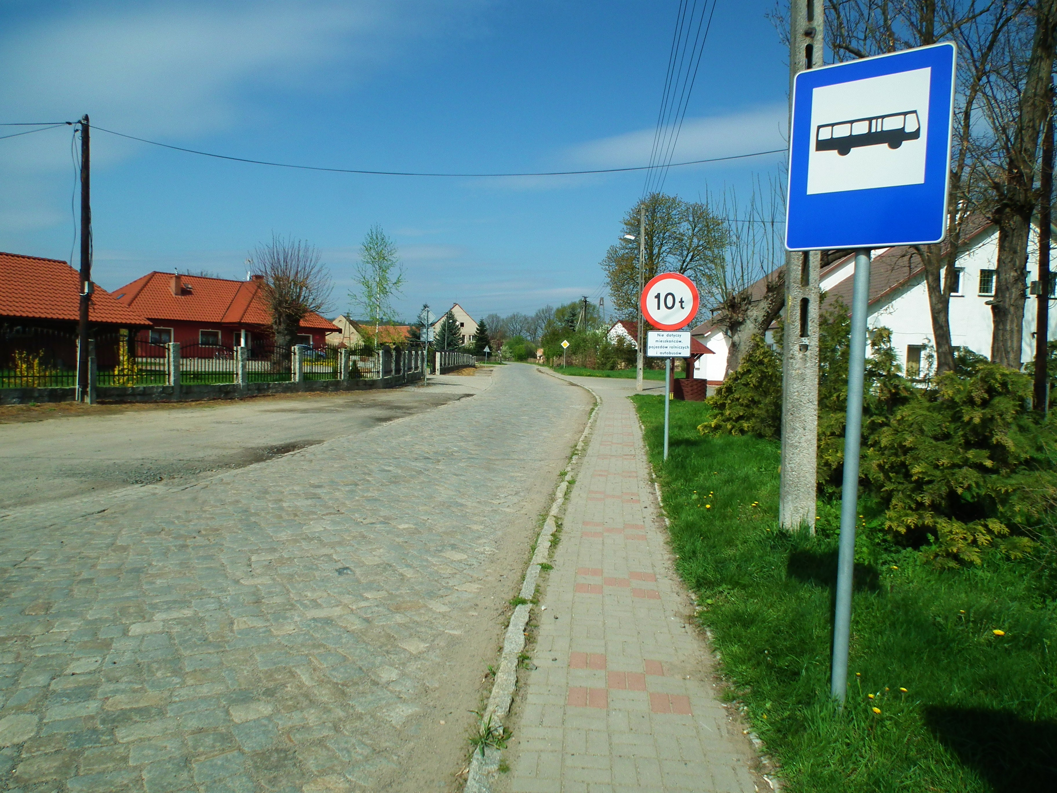 Krajów - wieś pod Legnicą.